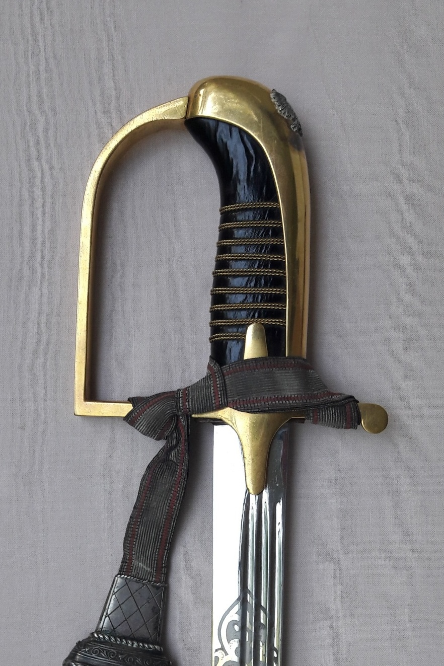 Polska szabla upominkowa wz.21 firmy G. Borowski; rok 1930 - rekojeść.